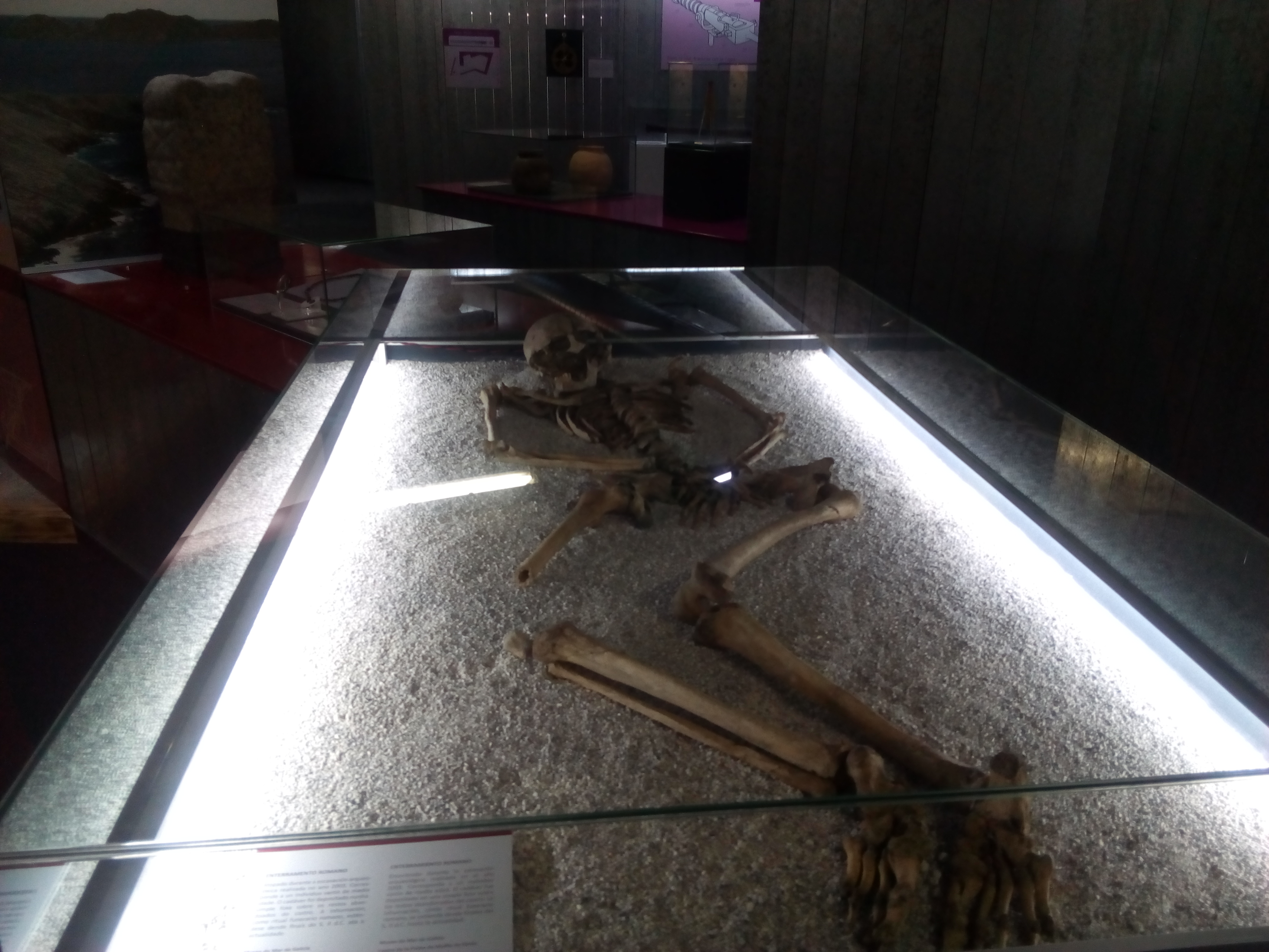 restos humanos del imperio romano expuestos en el museo do mar de Galicia (Vigo).